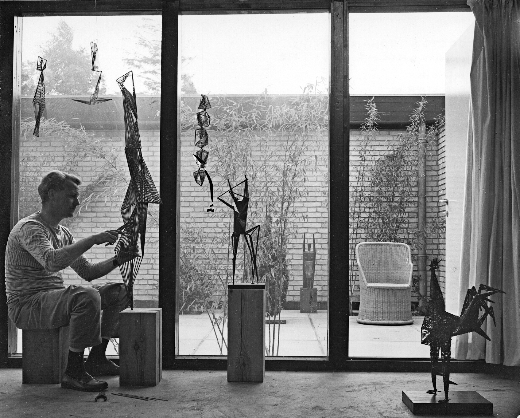 Torsten Johansson med et udvalg af sine skulpturer og møbler 1958